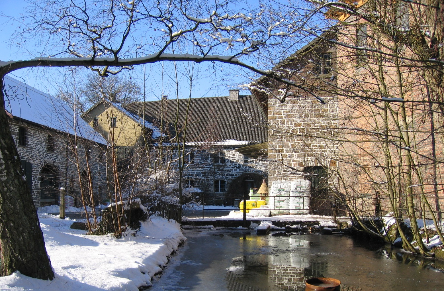 Description: "Alberts Mühle", Baudenkmal, erbaut 1865 in Hemer-Sundwig, Hönnetalstraße 39 a Source: selbst fotografiert Date: 29. Jan. 2006 Author: Asio otus